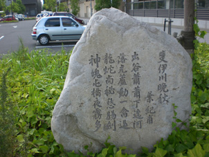 出雲市駅前に建立された葉紀甫の詩碑